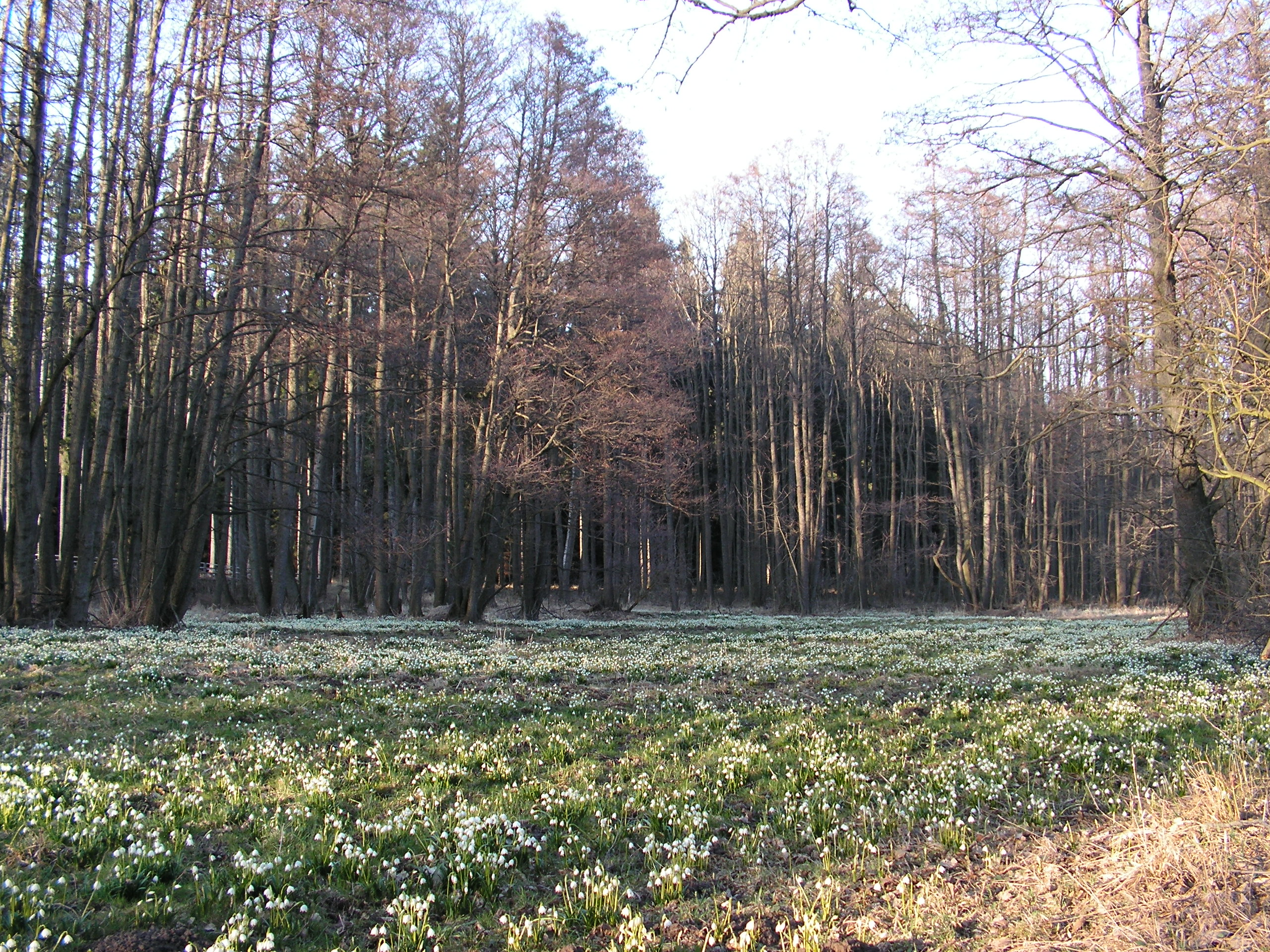 Přírodní rezervace Hroznětínská louka nedaleko obce Číhošť.